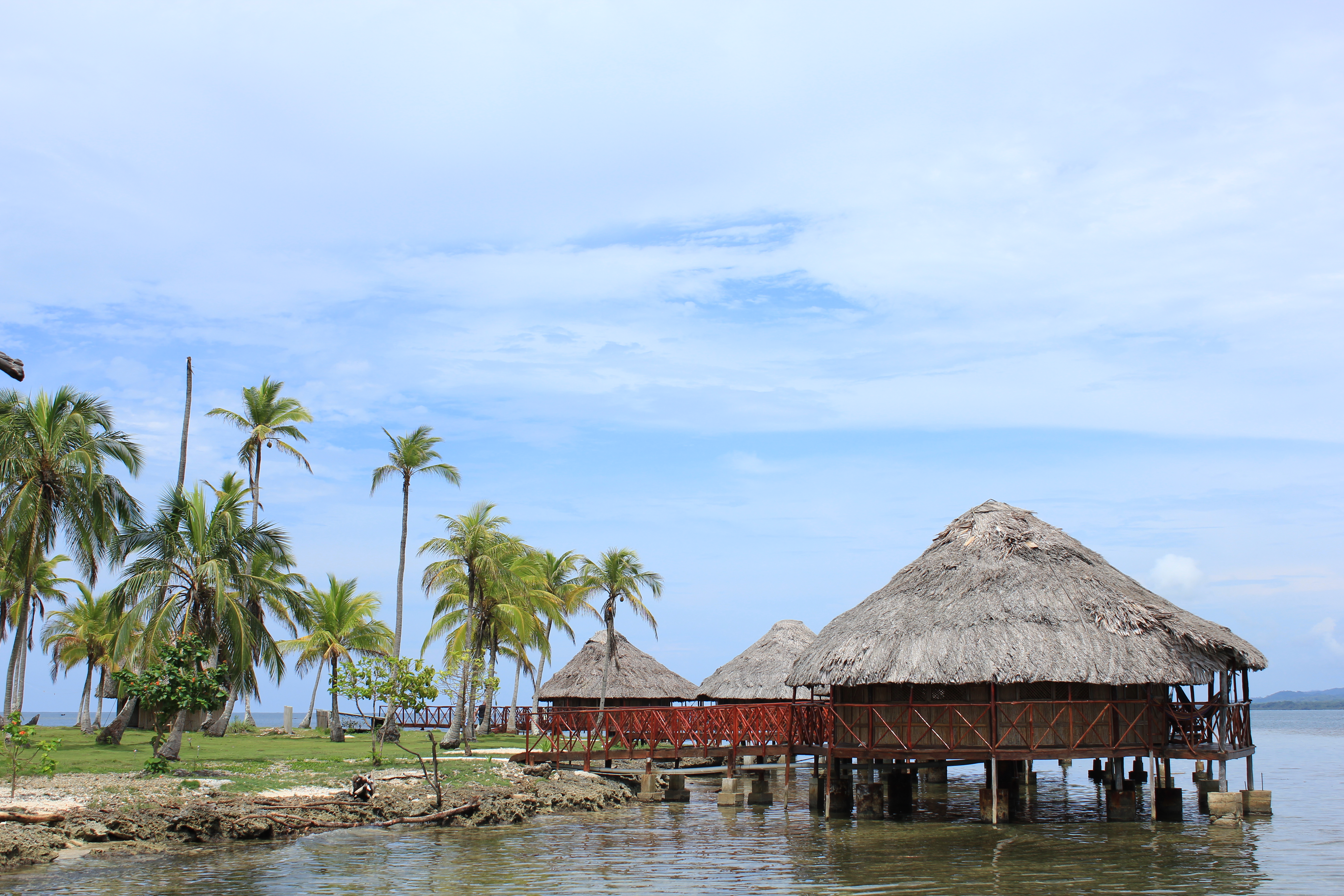 Yandup Island Lodge in Playón Chico, Guna Yala, Panamá .